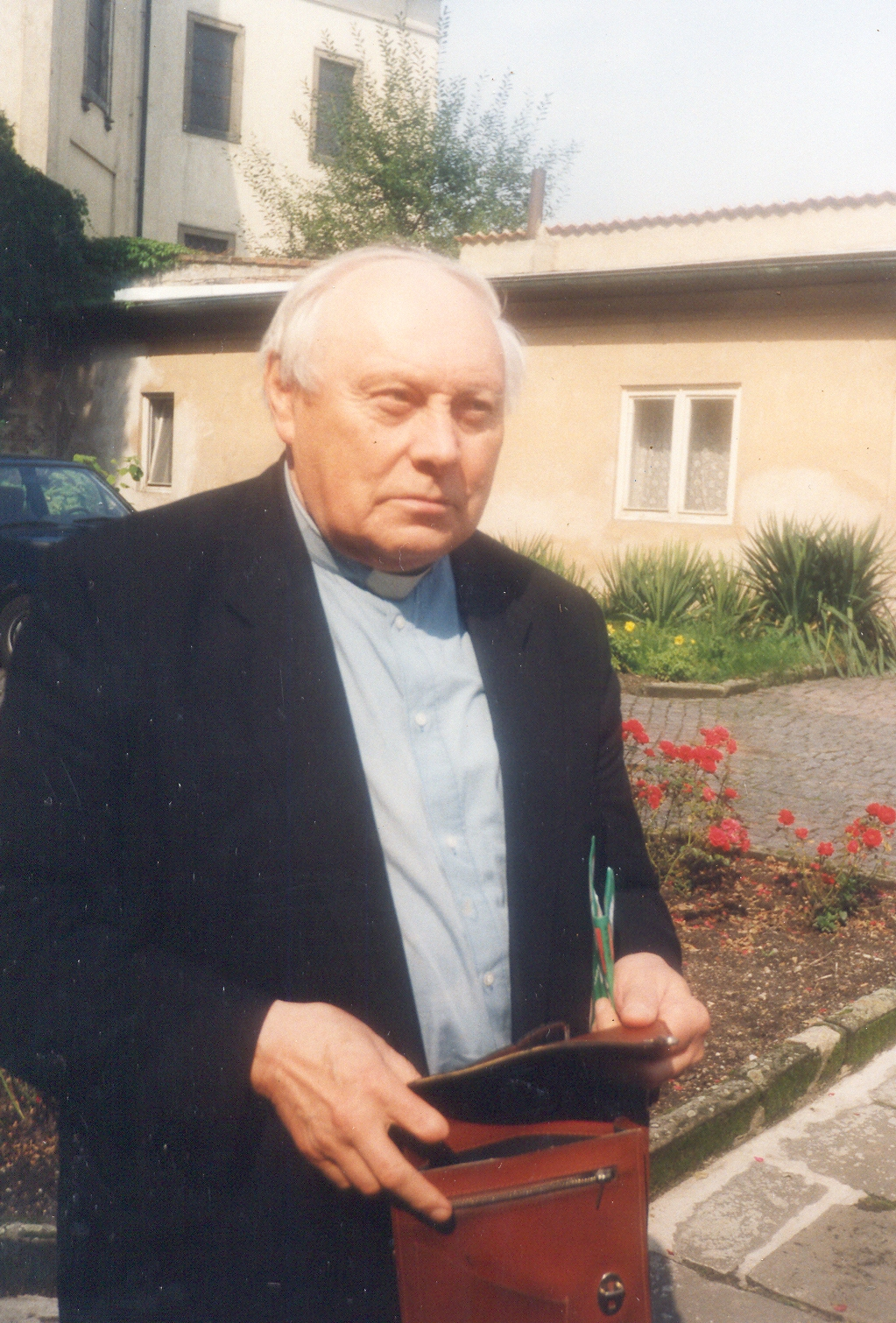 Kanovník Josef Helikar před rezidencí litoměřického biskupa (cca 90. léta 20. století)